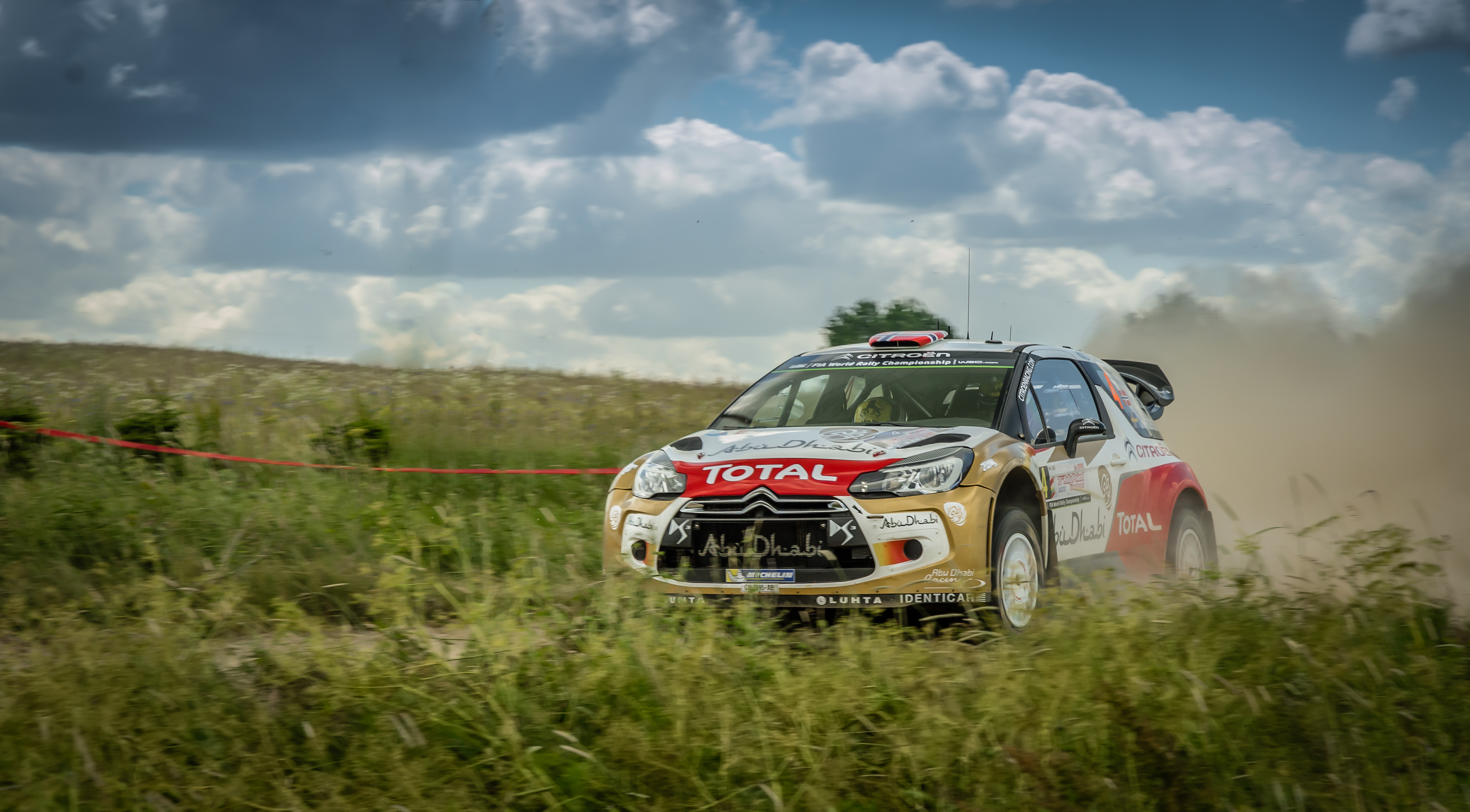 Rajd Polski 2014 Mads Østberg jadący Citroënem DS3 WRC